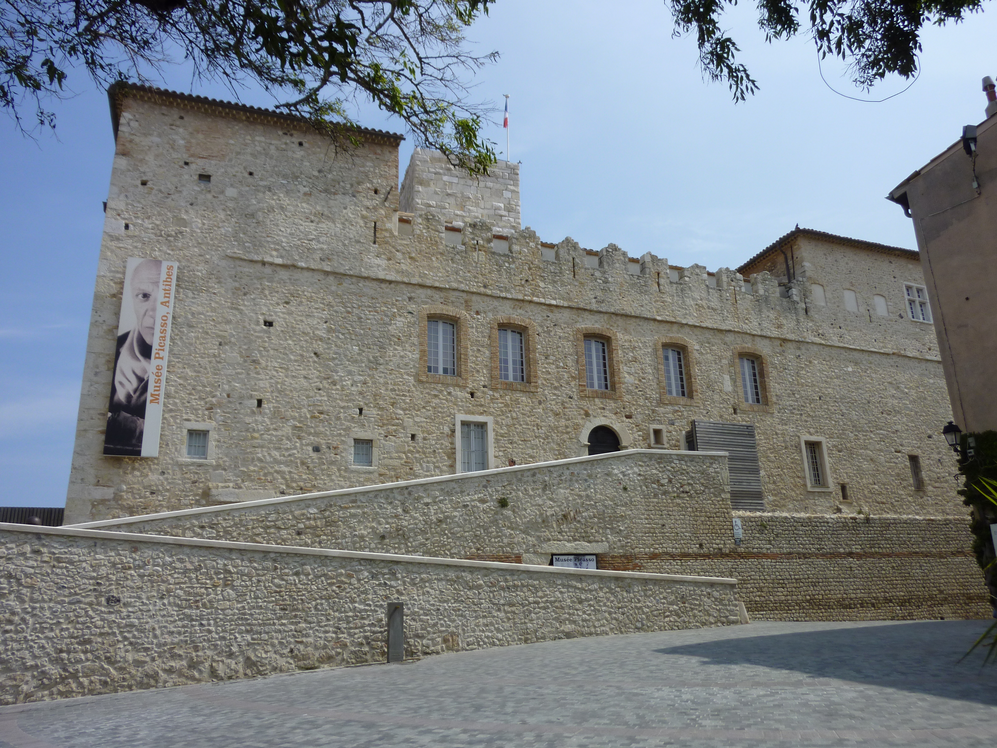 Château Grimaldi, actuel Musée Picasso, (Antibes, Alpes-Maritimes, France) .